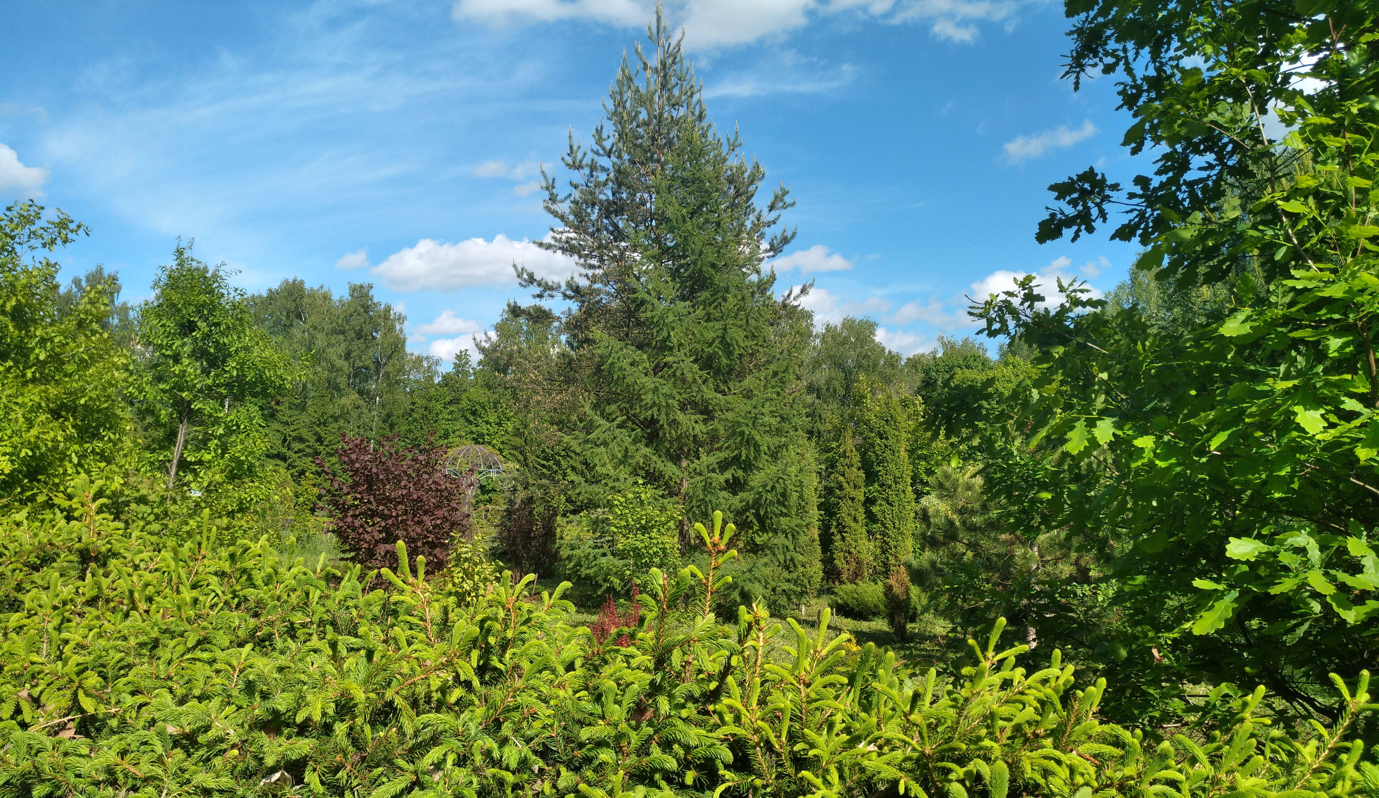 Чебоксарский филиал Главного ботанического сада им. Н.В. Цицина: Расположен вдоль речки Кукшумка в г. Чебоксары; вход в ботанический сад — со стороны проспекта И. Яковлева, Чебоксары, Чувашия This image is related to the protected area of Russia number 2100057